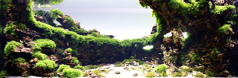 2016IAPLC 85위